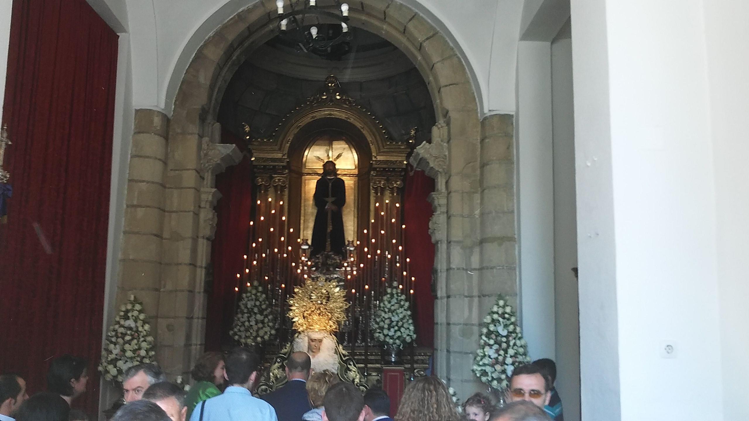 besamanos capilla Yedra Jerez